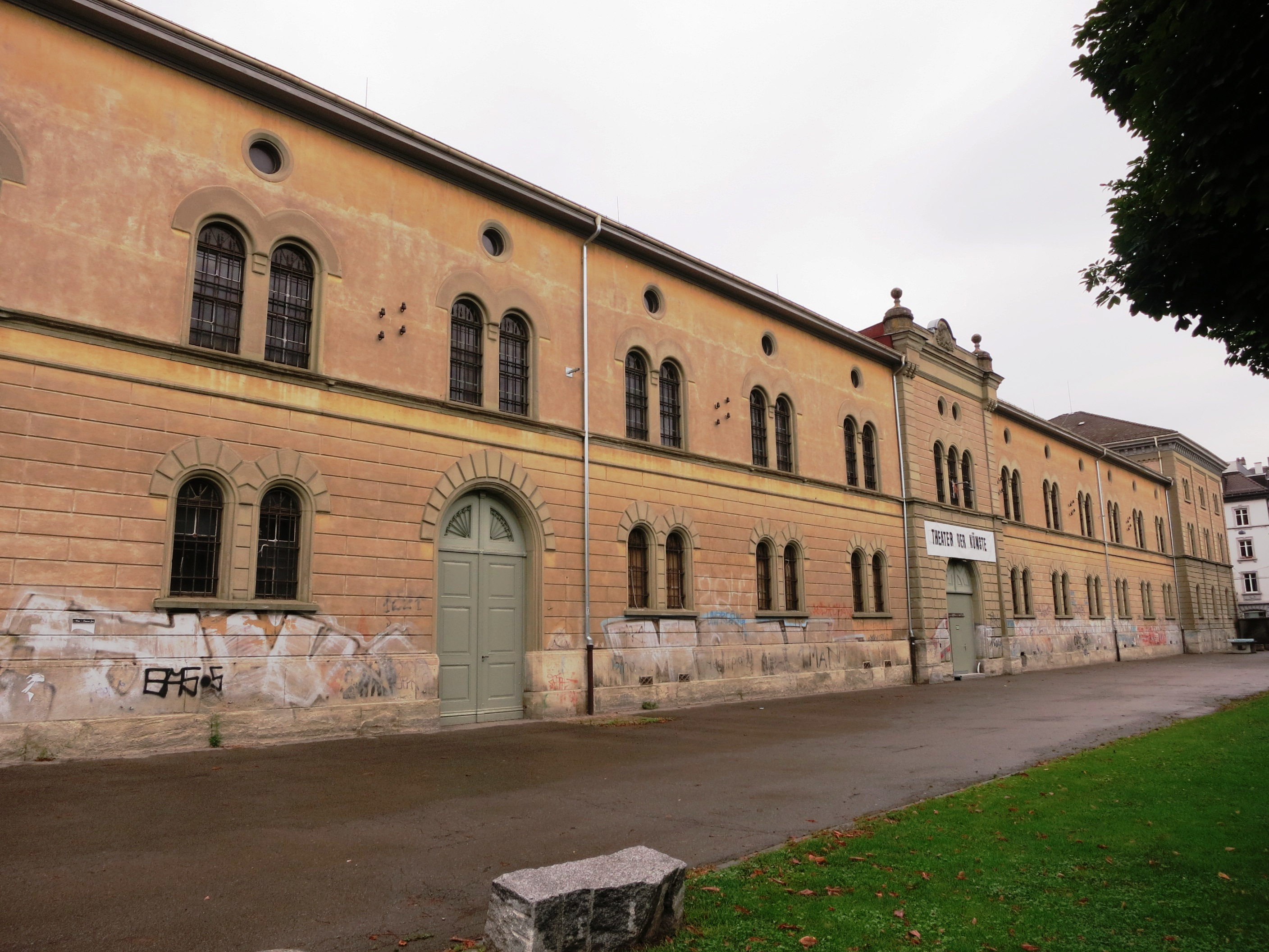 Kaserne Zürich, Zeughäuser 3/4, Zürich-Aussersihl, Schweiz